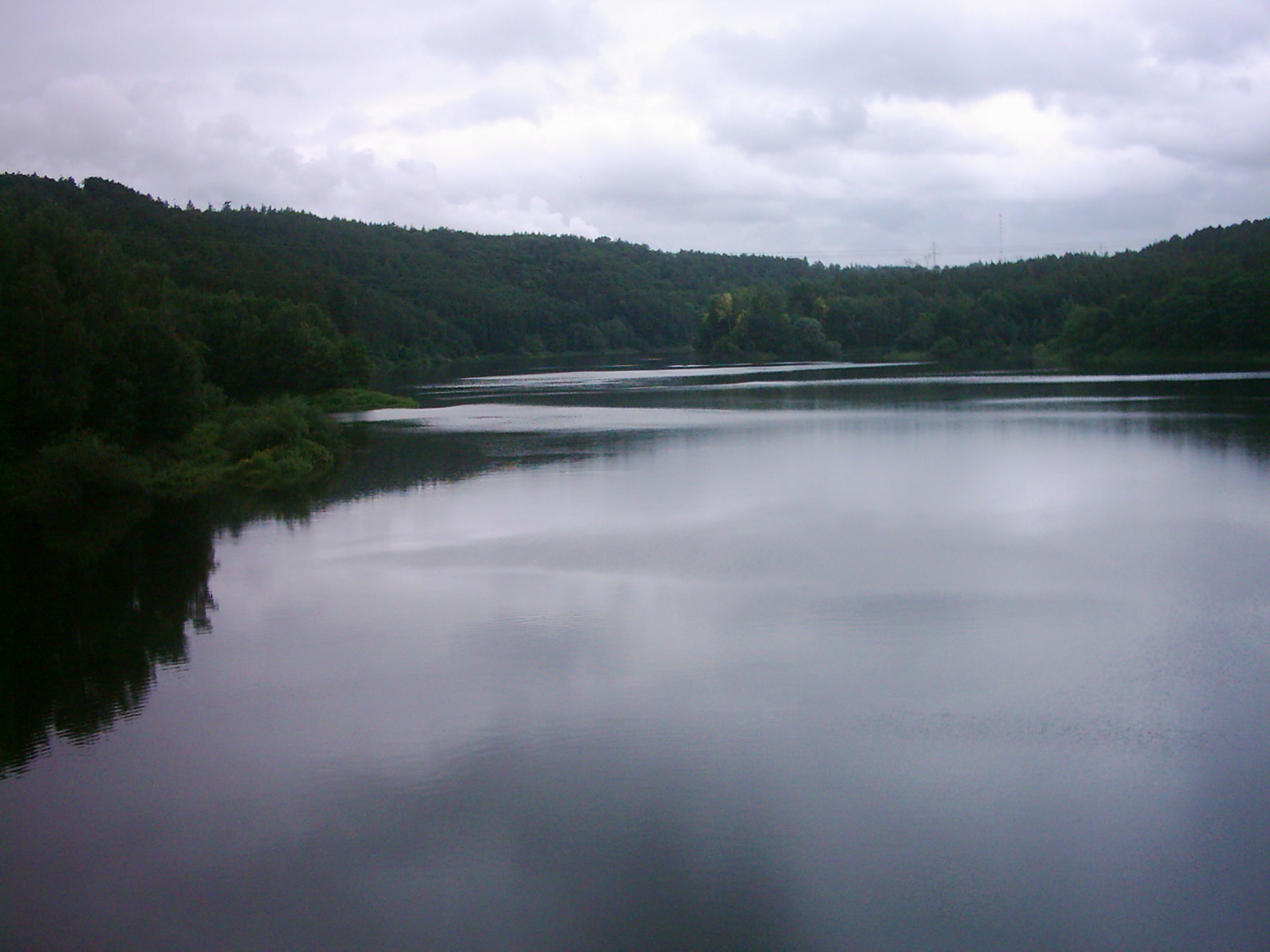 Přehradní jezero nádrže Mohelno, fotografováno z tělesa hráze